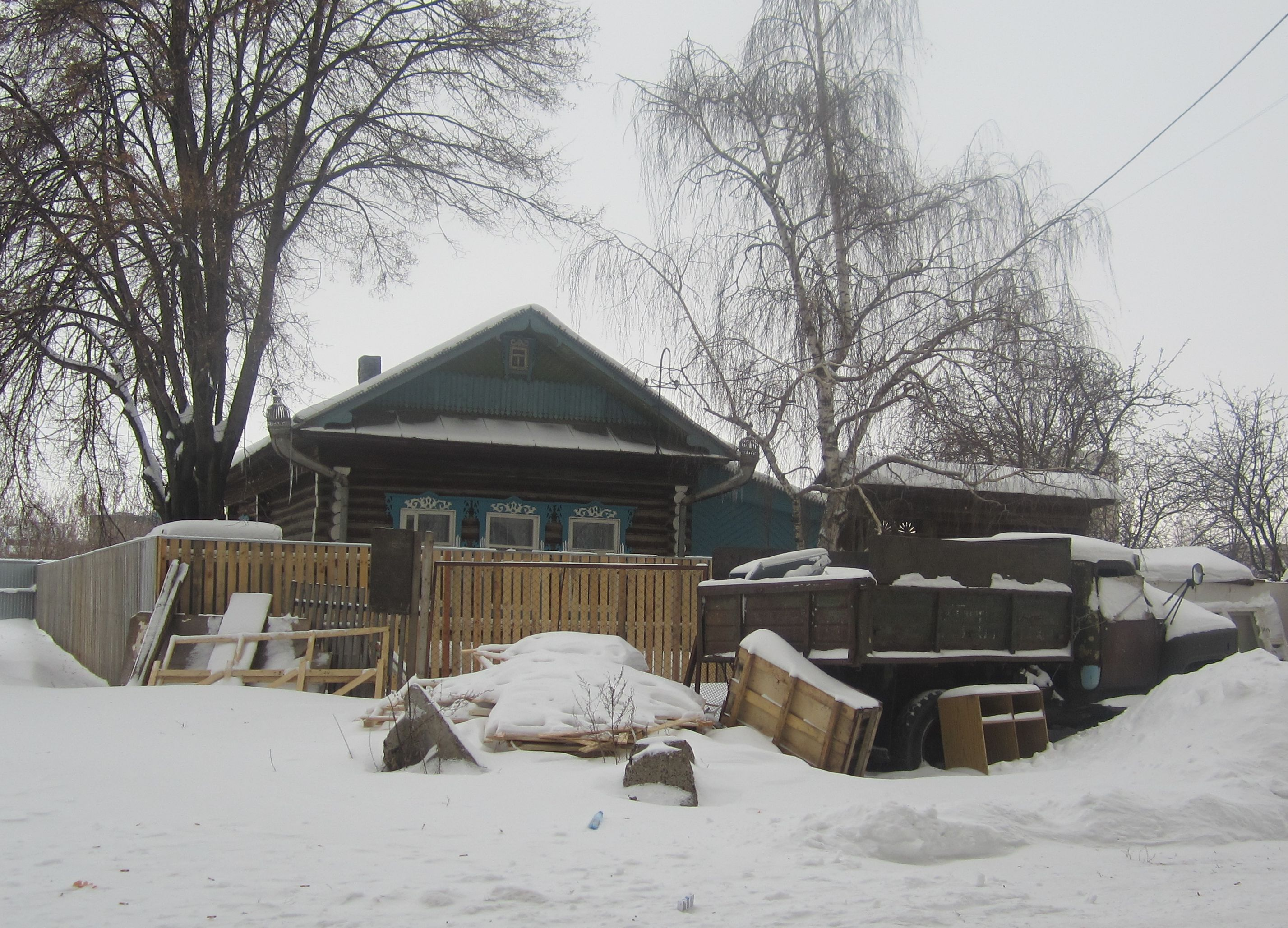 единственный частный дом, оставшийся после строительства микрорайона Бумажник